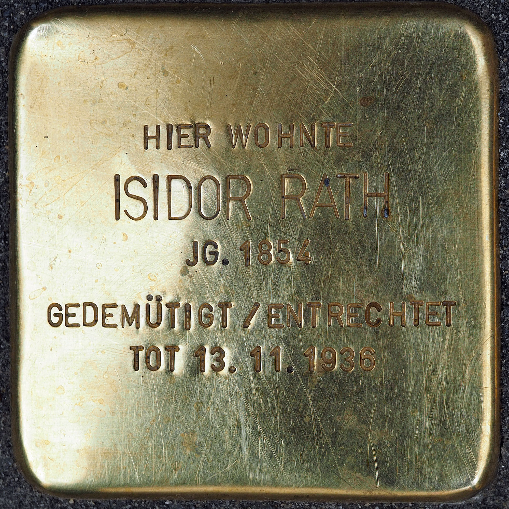 Stolpersteine Kempen: Rath, Isidor